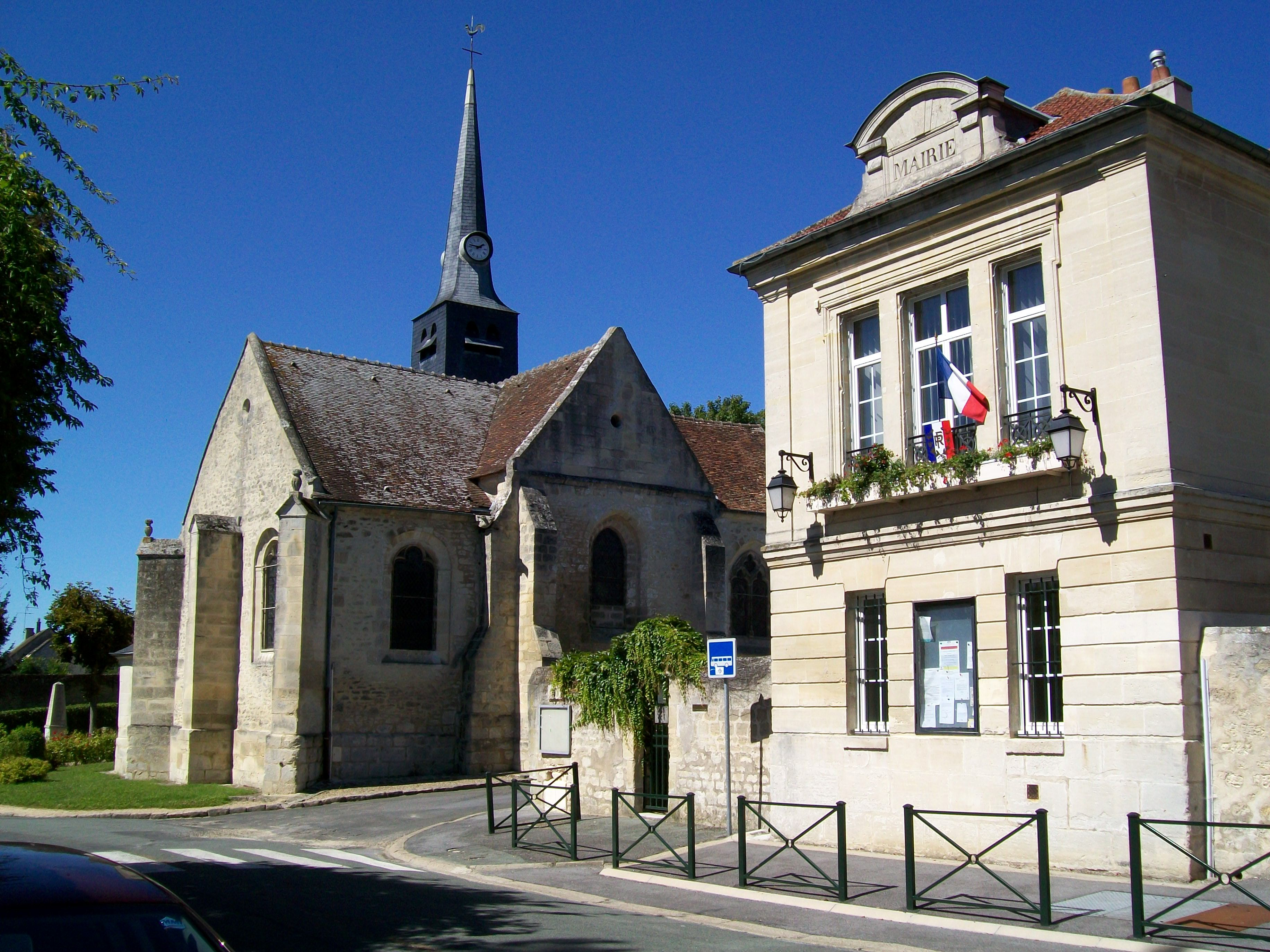 L'église Saint-Gervais, inscrite M.H., et la mairie.